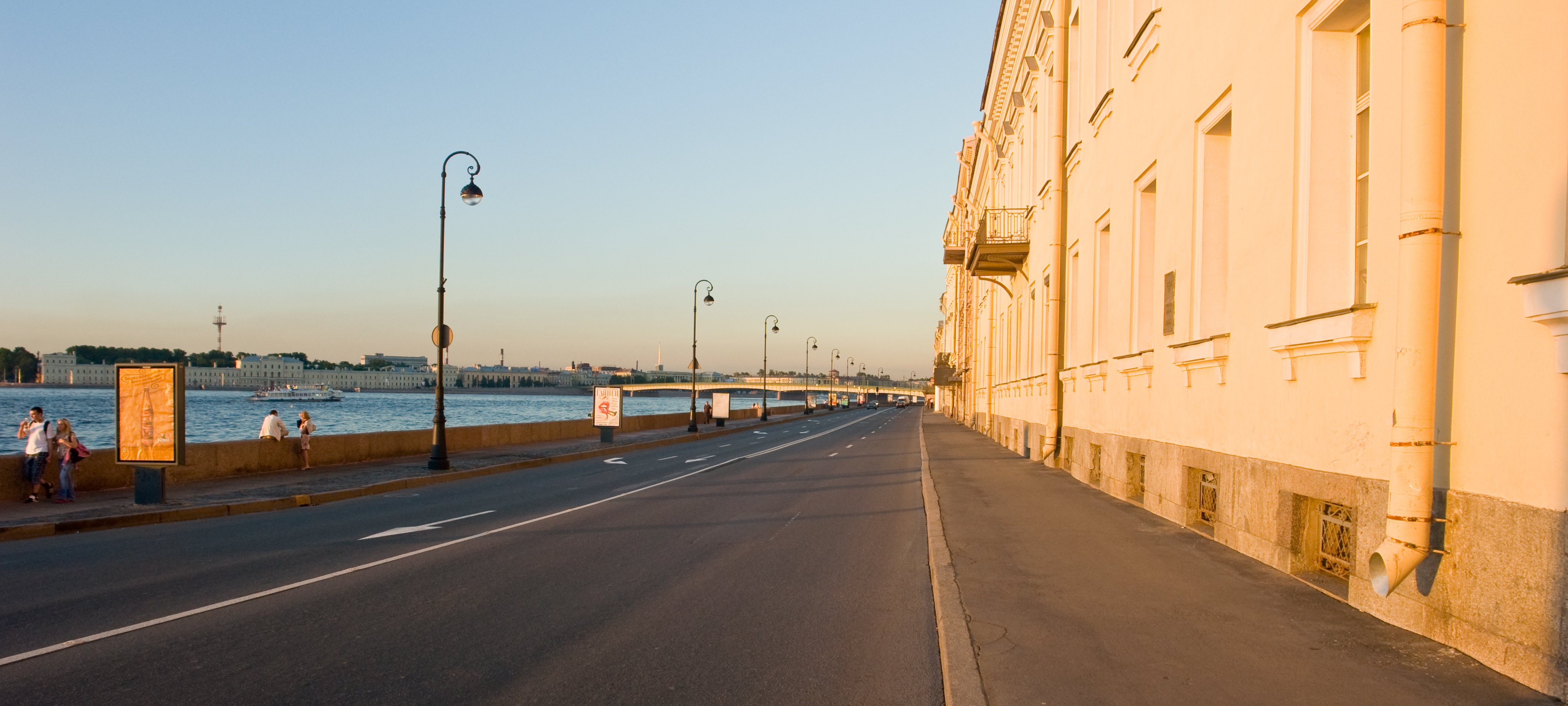 Набережная Кутузова (от Прачечного моста в сторону Литейного)